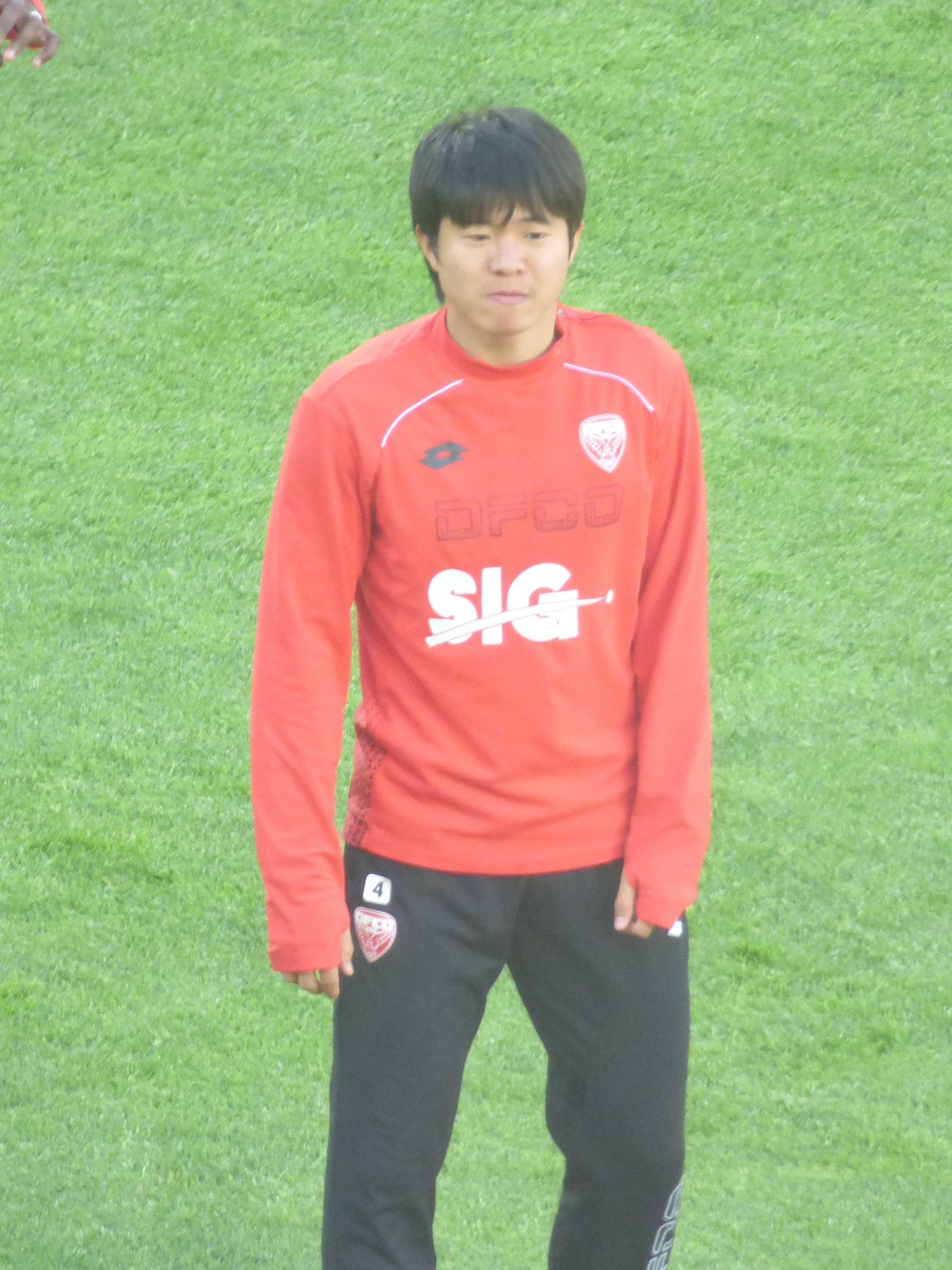 Kwon Chang-hoon avant le match RC Lens / Dijon FCO, match aller des barrages pour la montée en Ligue 1 2018-2019, le 30 juin 2019, au Stade Bollaert-Delelis.